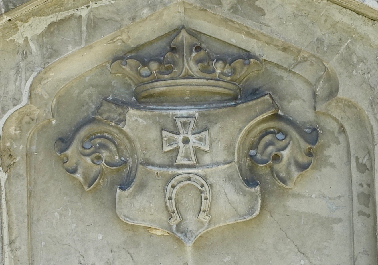 Herb Gorczyńskich z pomnika Jana Kalasantego Gorczyńskiego sprzed kościoła parafoialnego w Marcyporębie